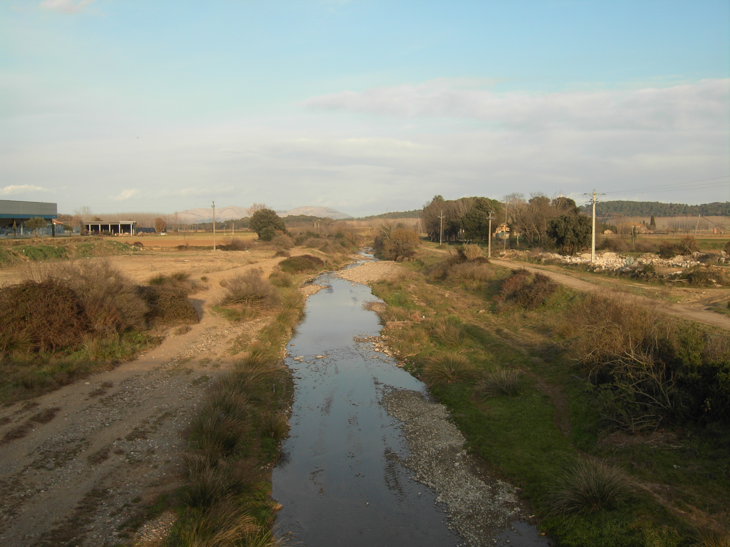 River Rissec on Corçà - Empordà, Catalonia